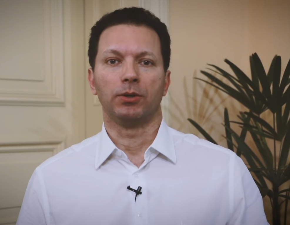 Screenshot de um vídeo em que o Prefeito de Porto Alegre, Nelson Marchezan, explica com o deputado federal Kim Kataguiri sobre suas funções políticas como prefeito, estando no Paço Municipal da Prefeitura.